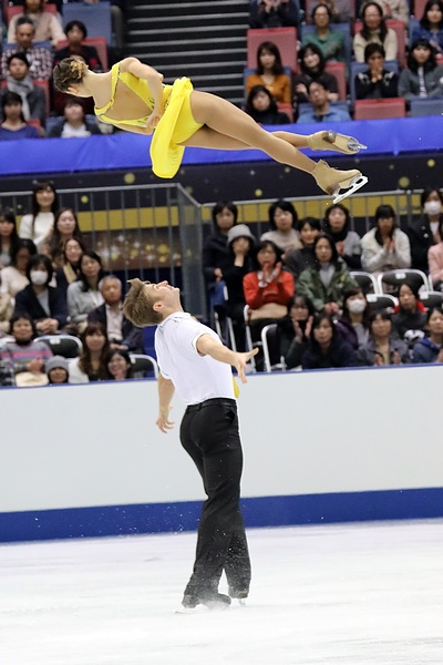 Кристина Астахова и Алексей Рогонов на NHK Trophy 2017